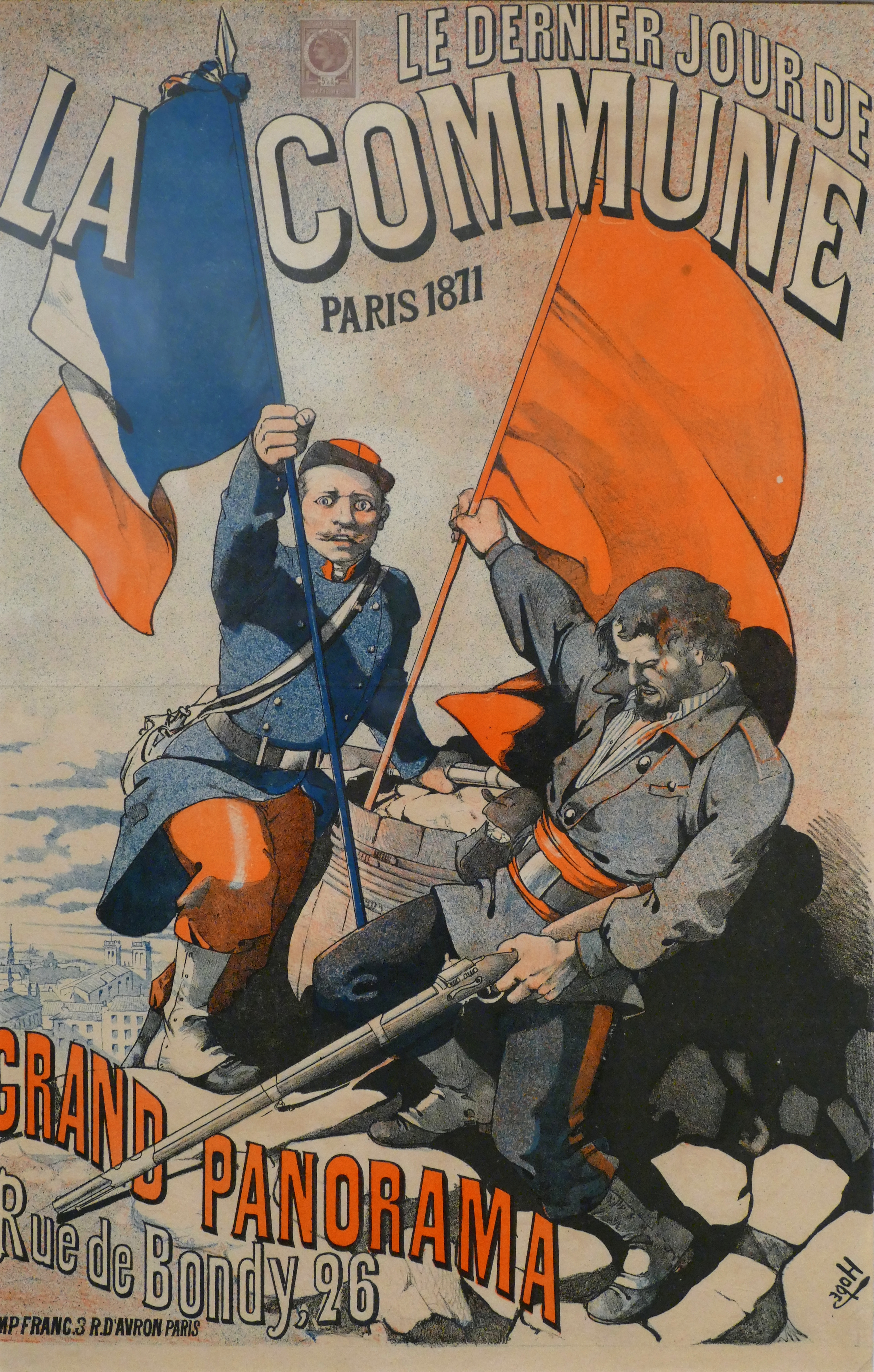 Affiche de Leon Choubrac (Hope) publicité pour le panorama du 26 rue de Bondy à Paris. Musée de l'Armée : Exposition France-Allemagne(s), 1870-1871, La guerre, la Commune, les mémoires. 13 avril-30 juillet 2017. Prêt du Musée de l'Histoire vivante (Montreuil) N°inv 819284.